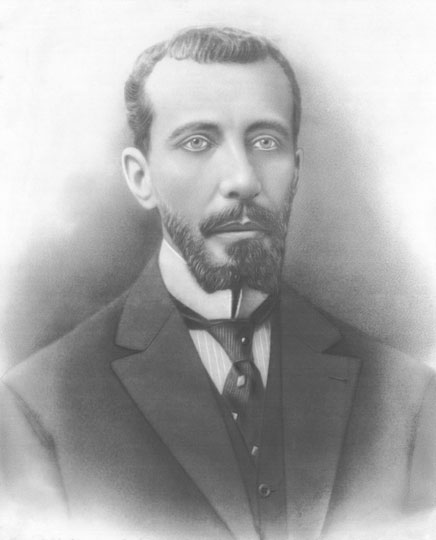 Coronel Nestor Gomes, nascido na Bocaina, Conceição de Macabu, foi governador e senador pelo Estado do Espírito Santo. da fazenda de sua família (a Fazenda Descoberta Feliz), surgiu o bairro da Bocaina.